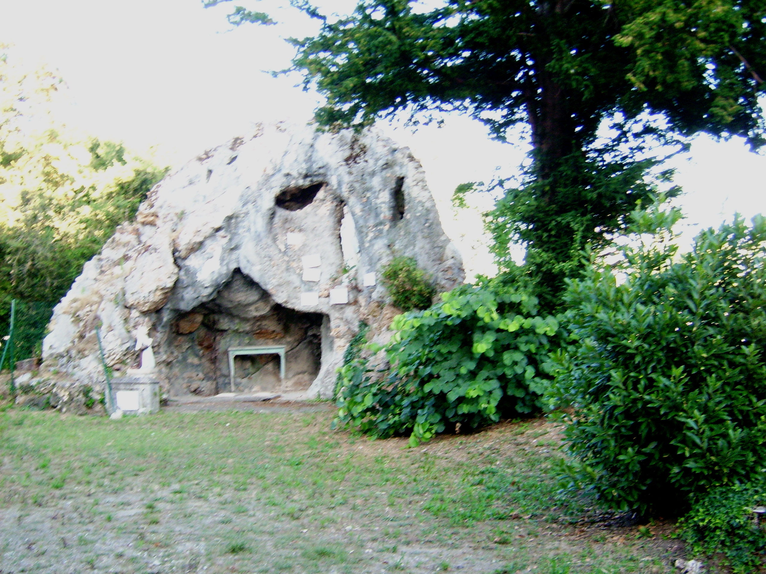 Reconstitution de la Grotte de Lourdes